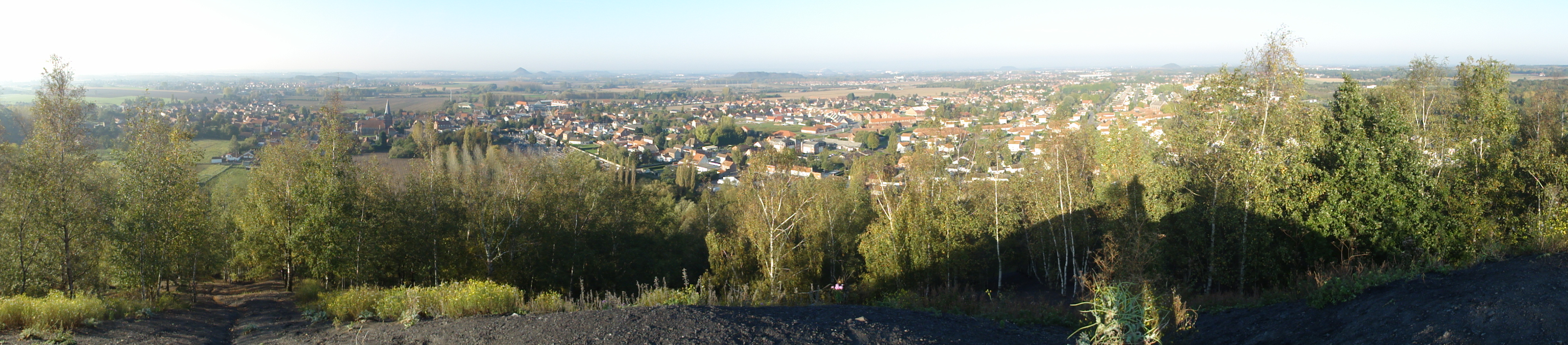 Terril n° 108 dit 7 d'Oignies, Fosse n° 7 - 7 bis de la Compagnie des mines d'Ostricourt, Ostricourt, Nord, Nord-Pas-de-Calais, France.